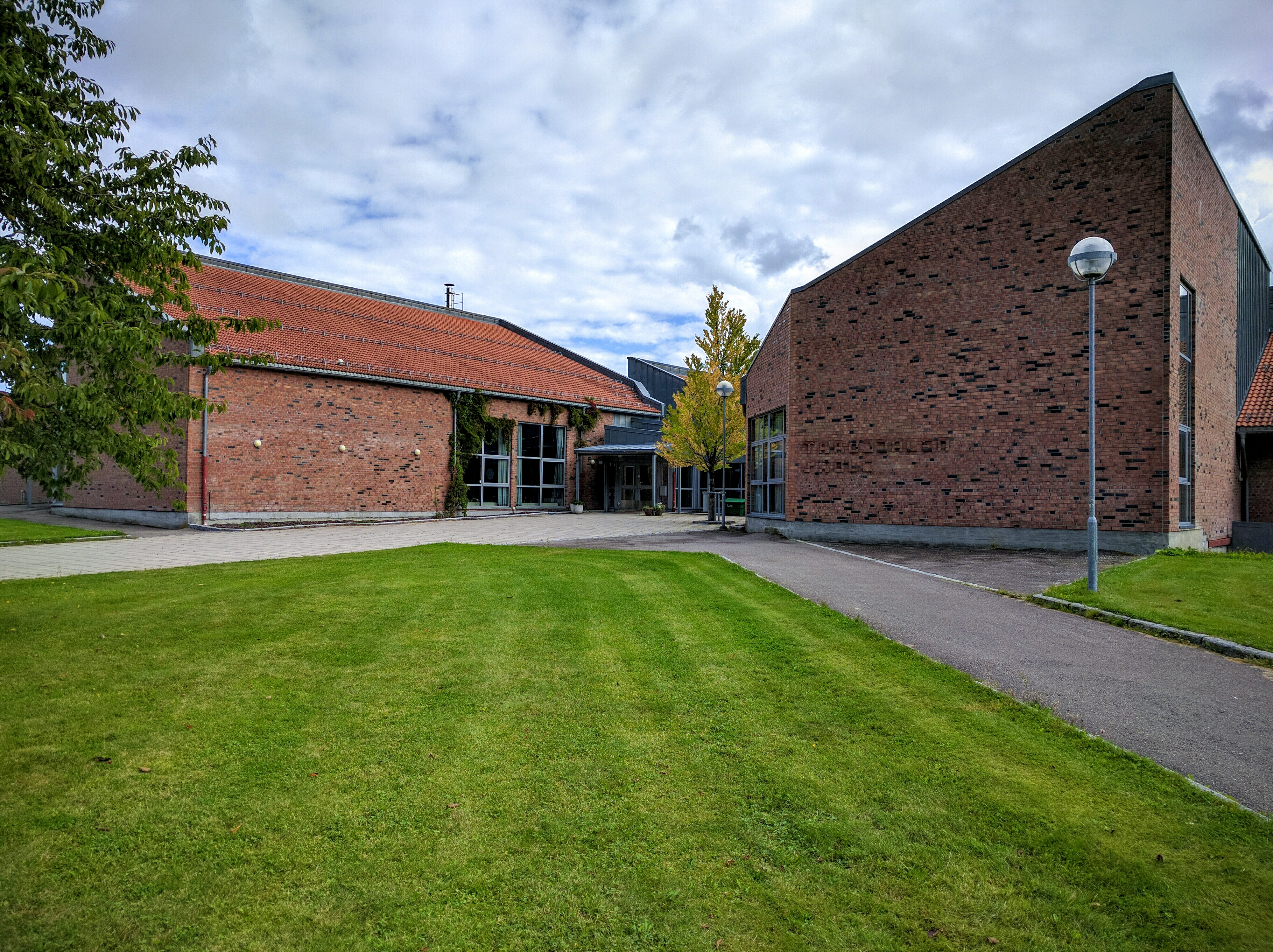 Tæruddalen skole på Skedsmokorset